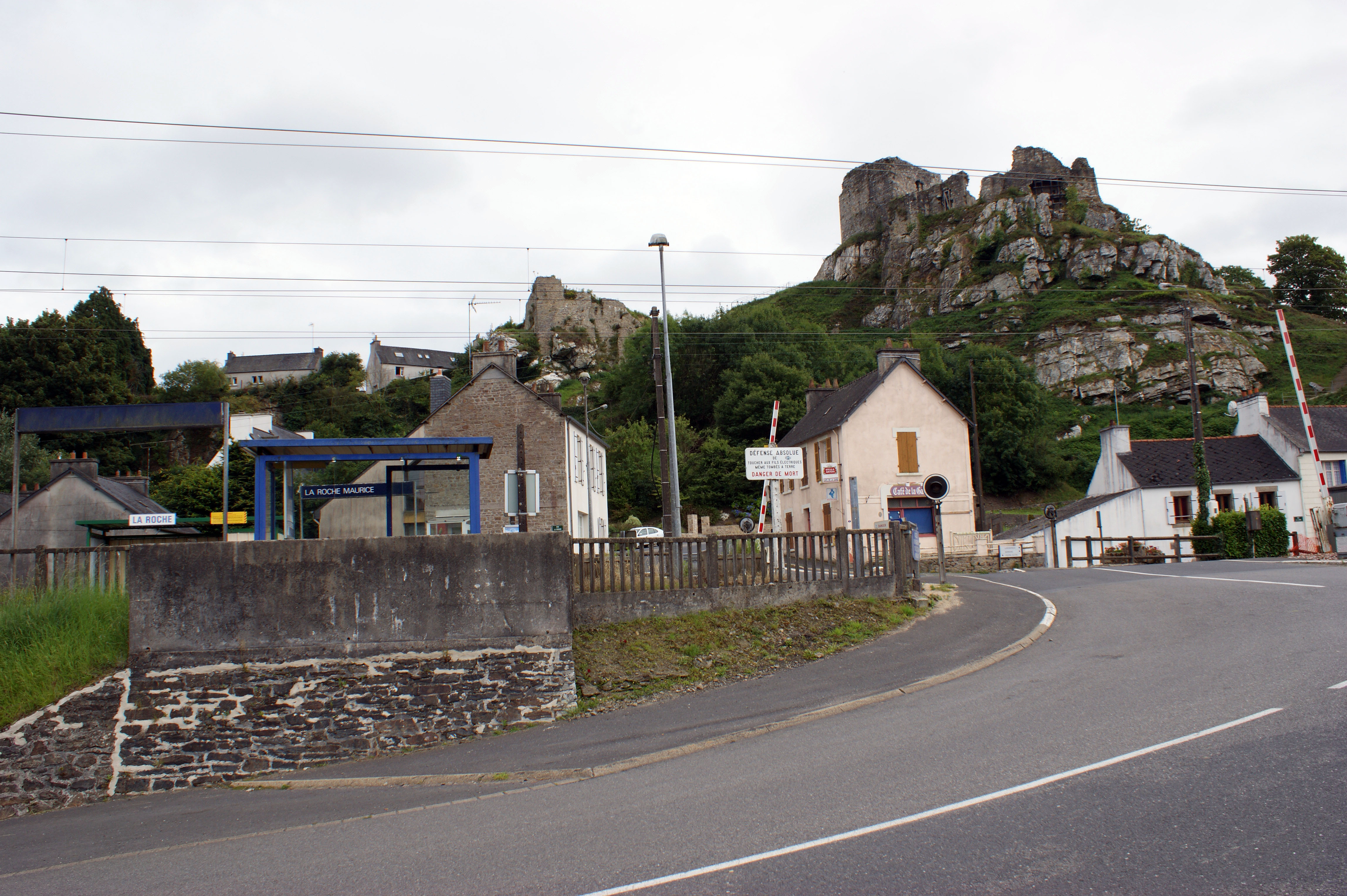 Gare de La Roche-Maurice, vue de la gare et du passage à niveau et de la Roche.